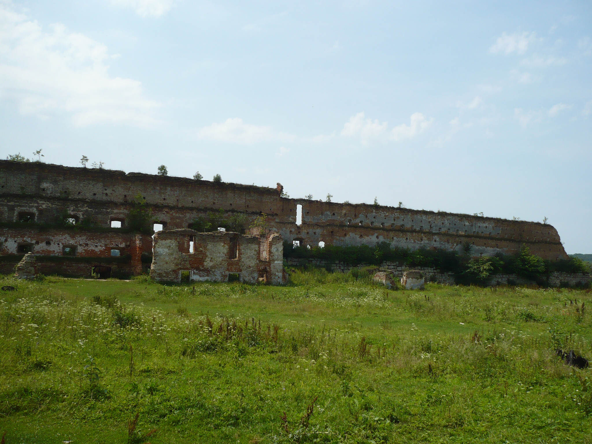 Starym Sioło - zamek księcia Zasławskiego, dziedziniec.